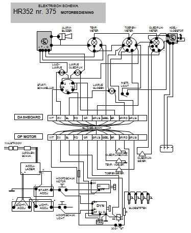 Elektrisch schema van een dieselmotor